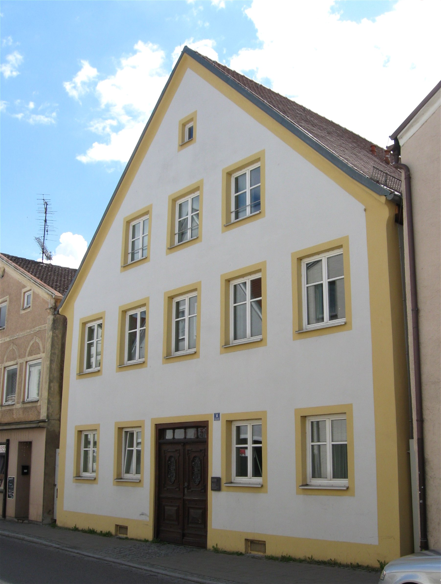 Ostenstraße 14; Wohnhaus, stattliches giebelständiges Mittelflurhaus mit Steilsatteldach und reichgearbeiteter zweiflügeliger Haustür mit Oberlicht, 1706 (dendro.dat.), im Kern älter. D-1-76-123-167